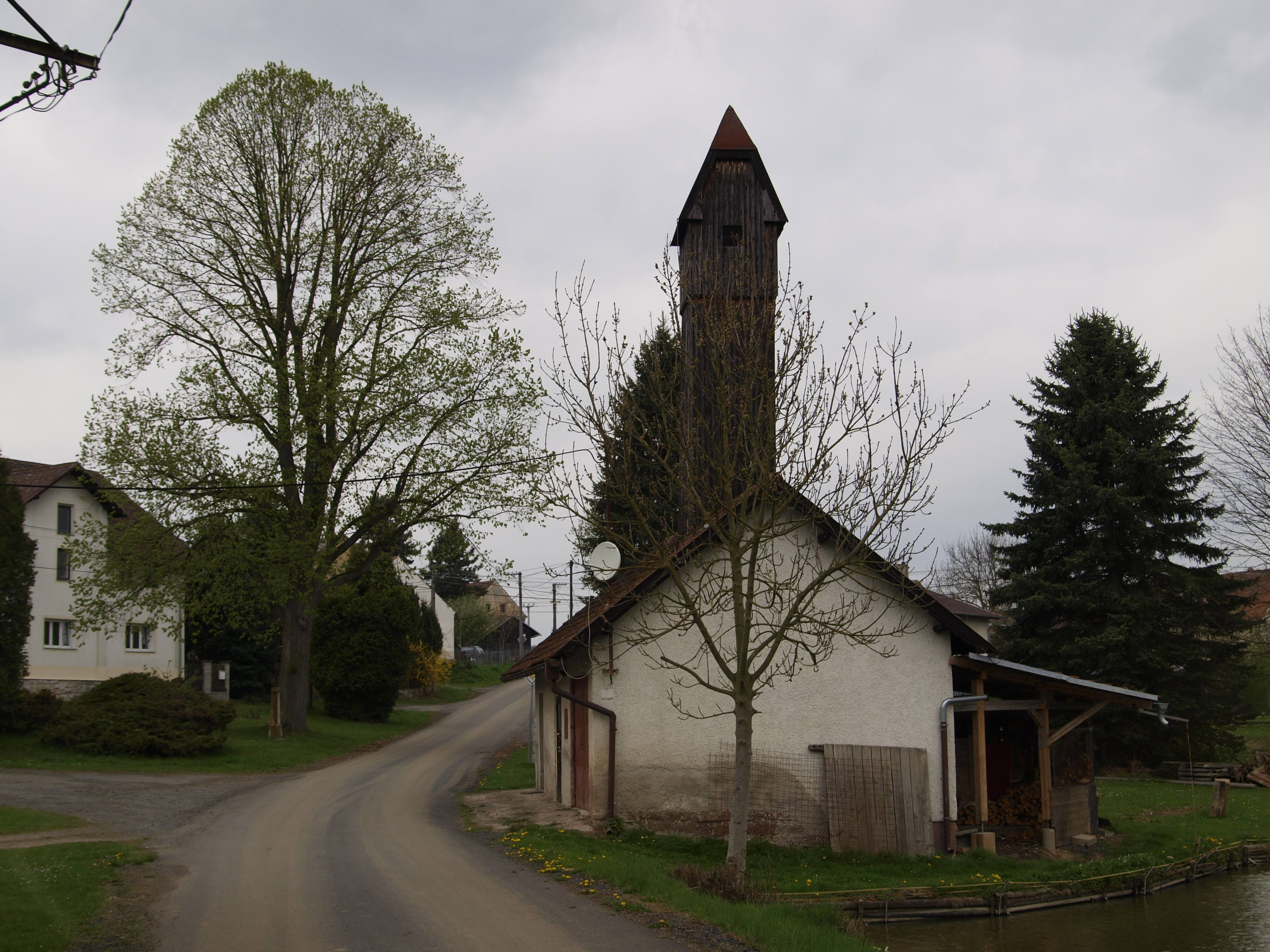 Hasičská zbrojnice v Březí